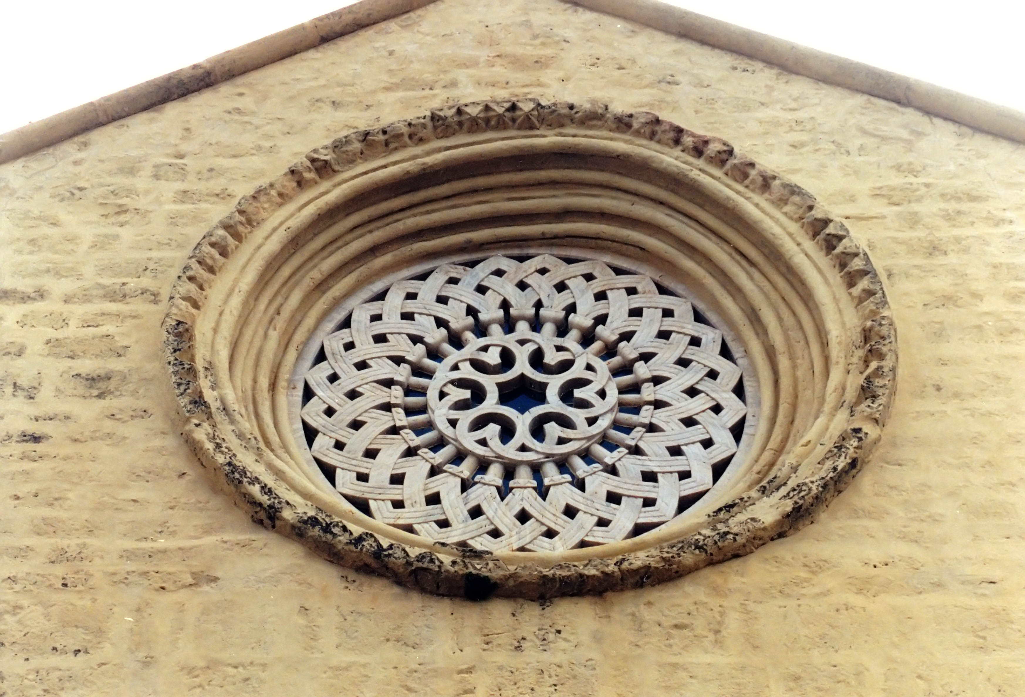 Espagne - Andalousie - Cordoue - Église de la Magdalena